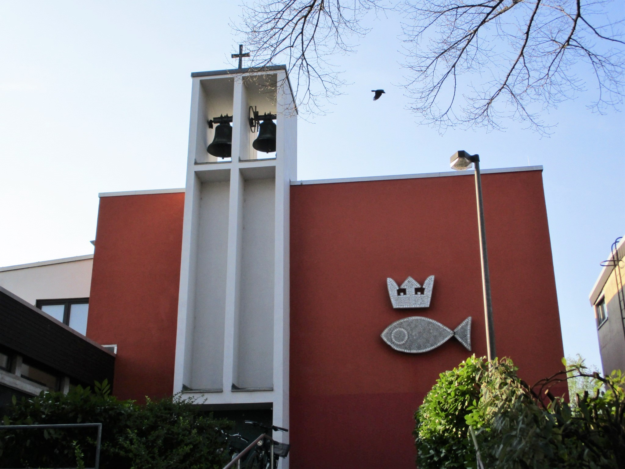 Christ-König-Kirche Frankfurt-Praunheim